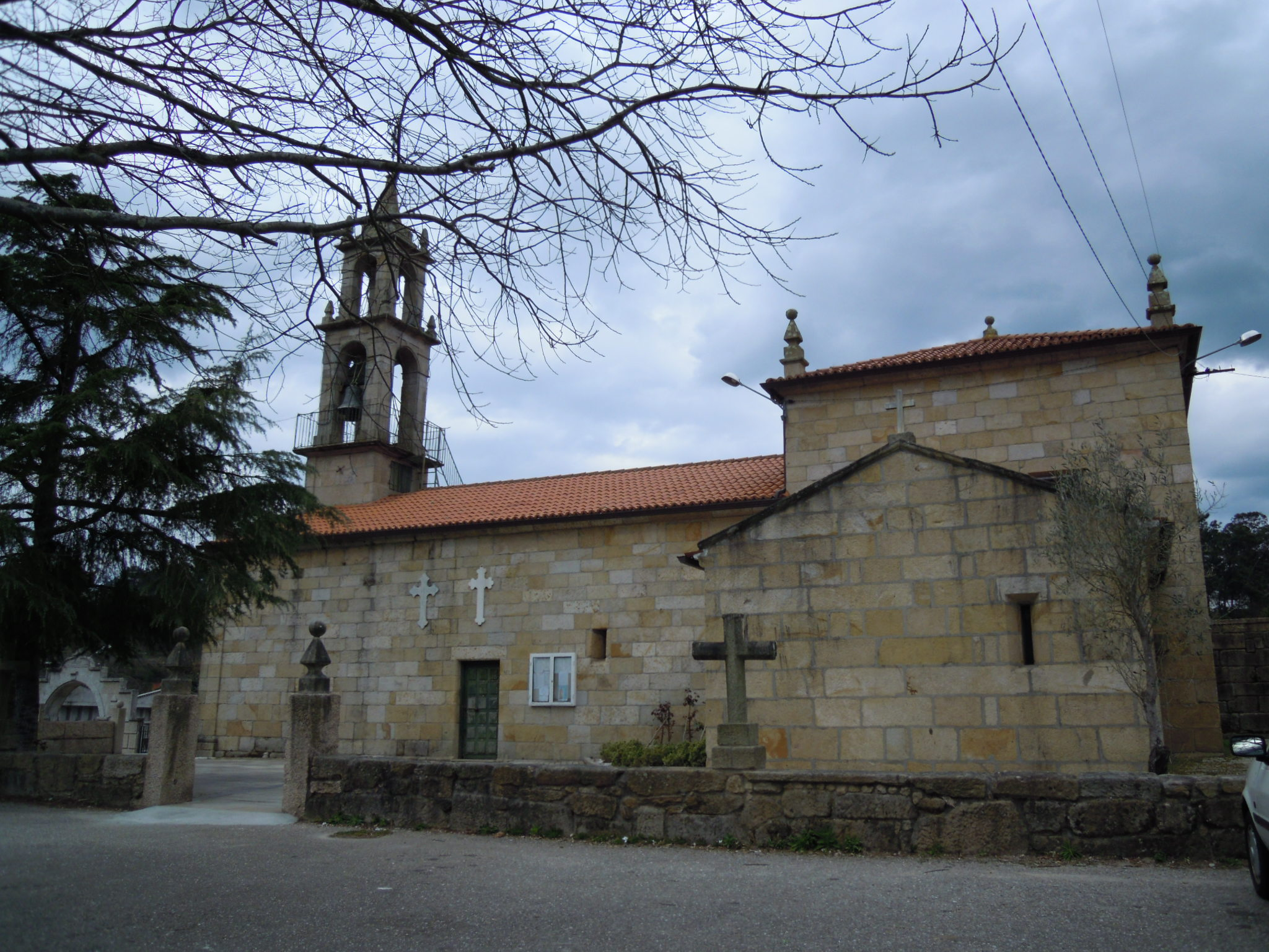 Igrexa parroquial de Tameiga (Mos)